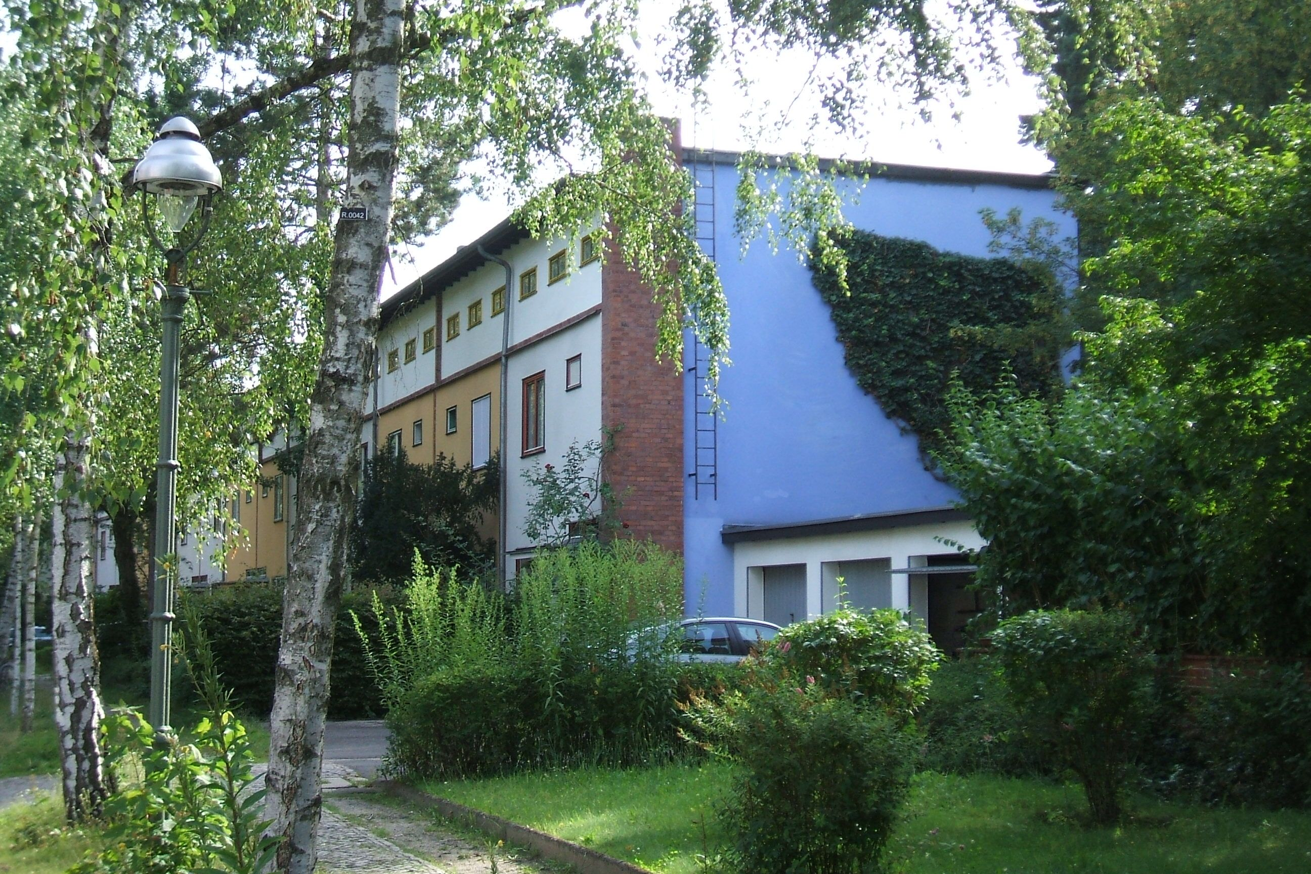 Berlin, Zehlendorf, ein Haus Am Fischtal in Berlin Zehlendorf